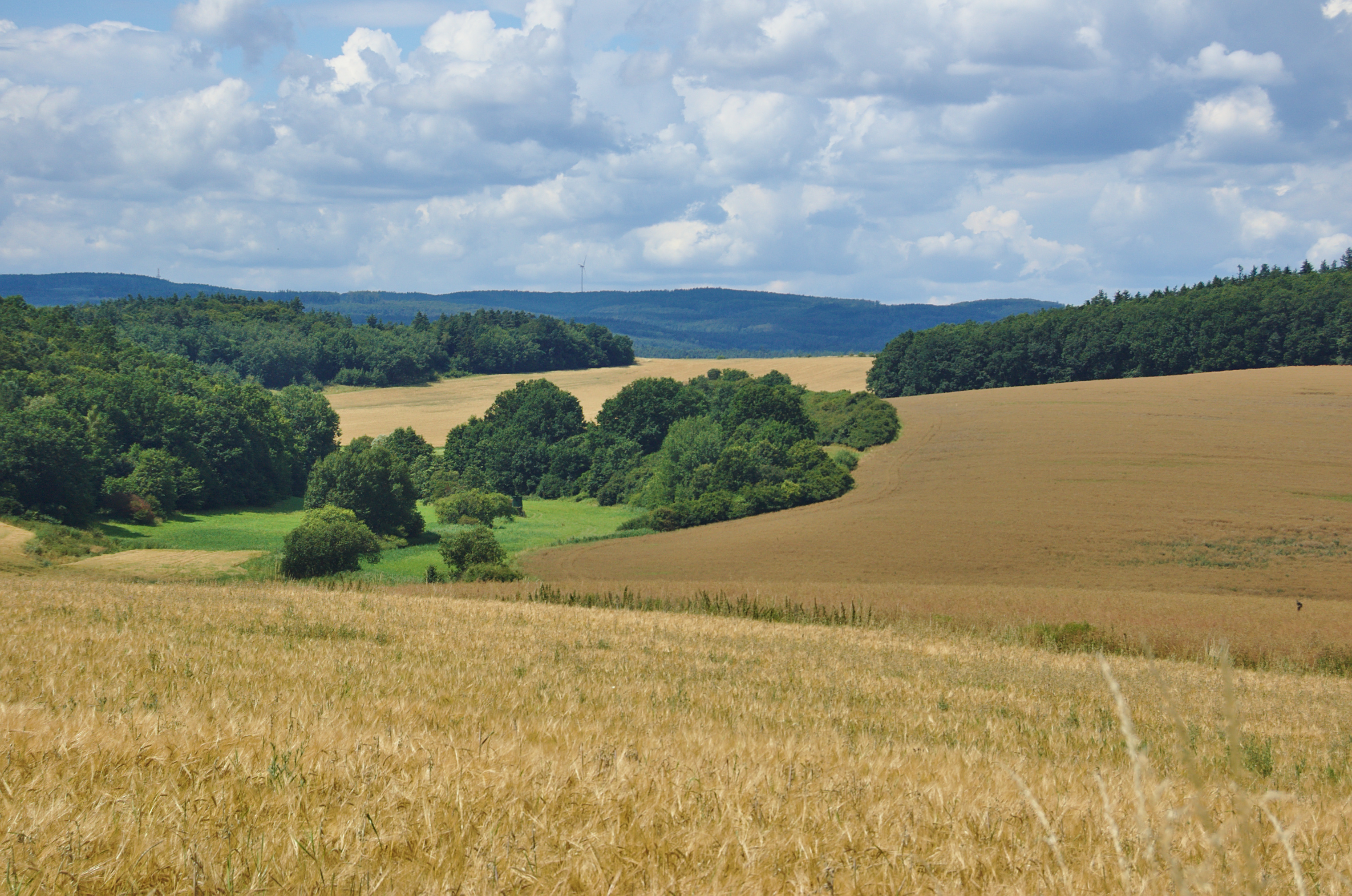 Výhled na přírodní rezervaci Kněží hora od východu, okres Prostějov